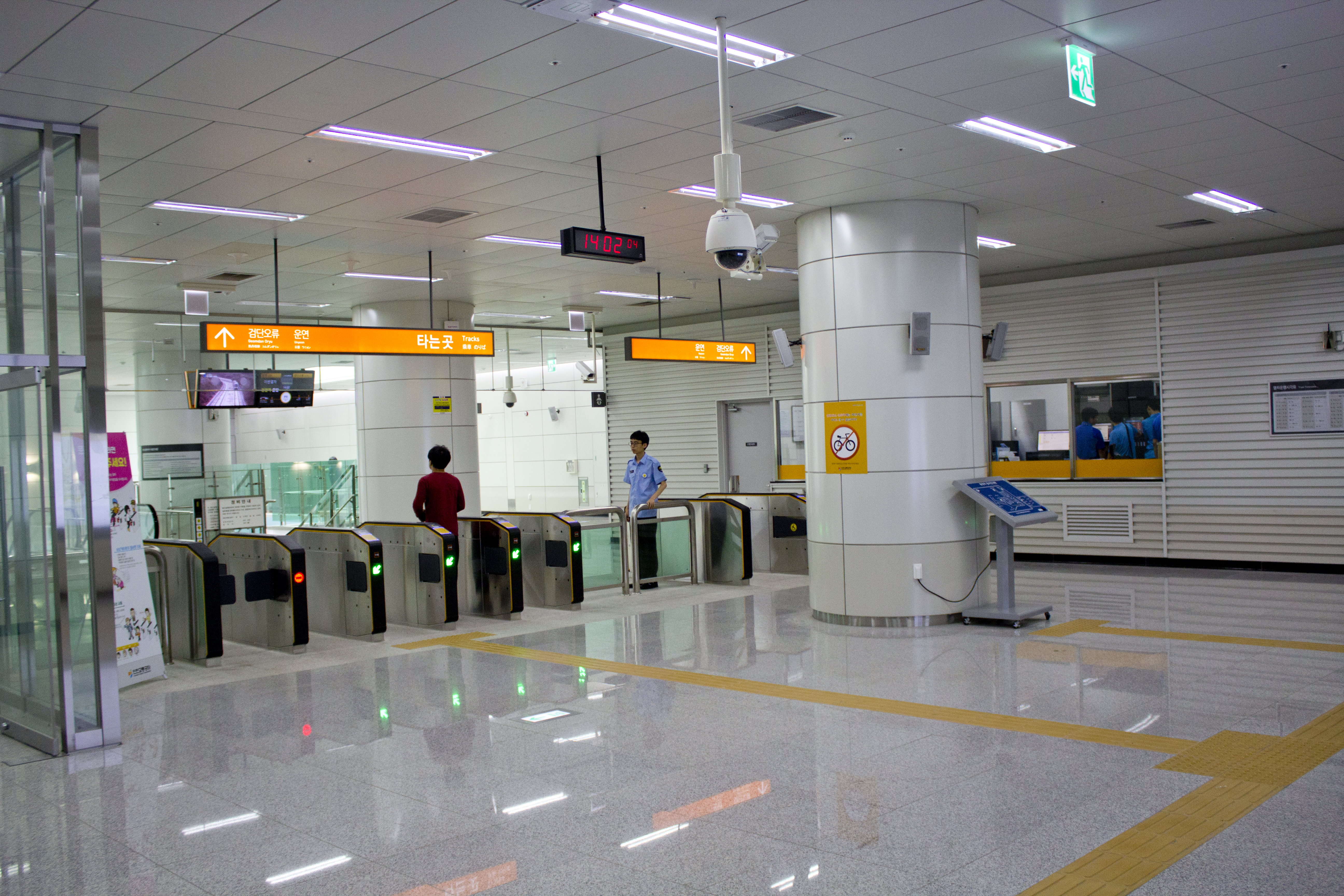 인천2호선 완정역 맞이방(대합실)